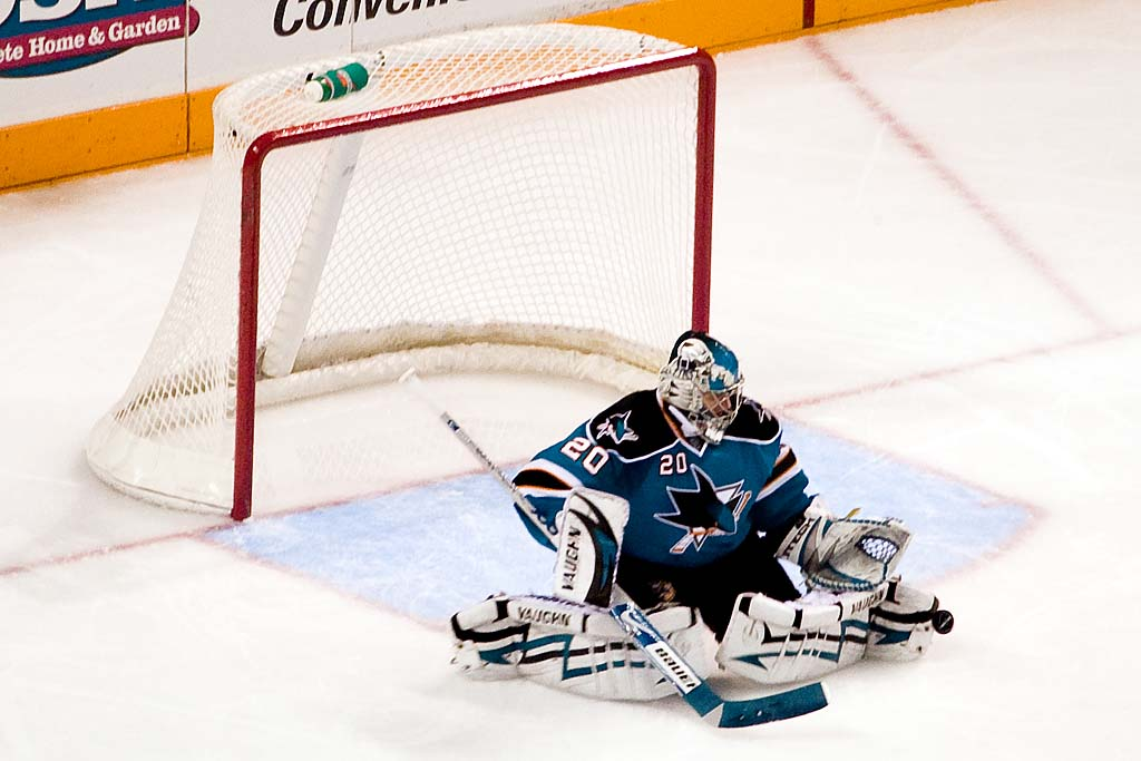 Evgeni Nabokov, Colorado Avalanche vs. San Jose Sharks